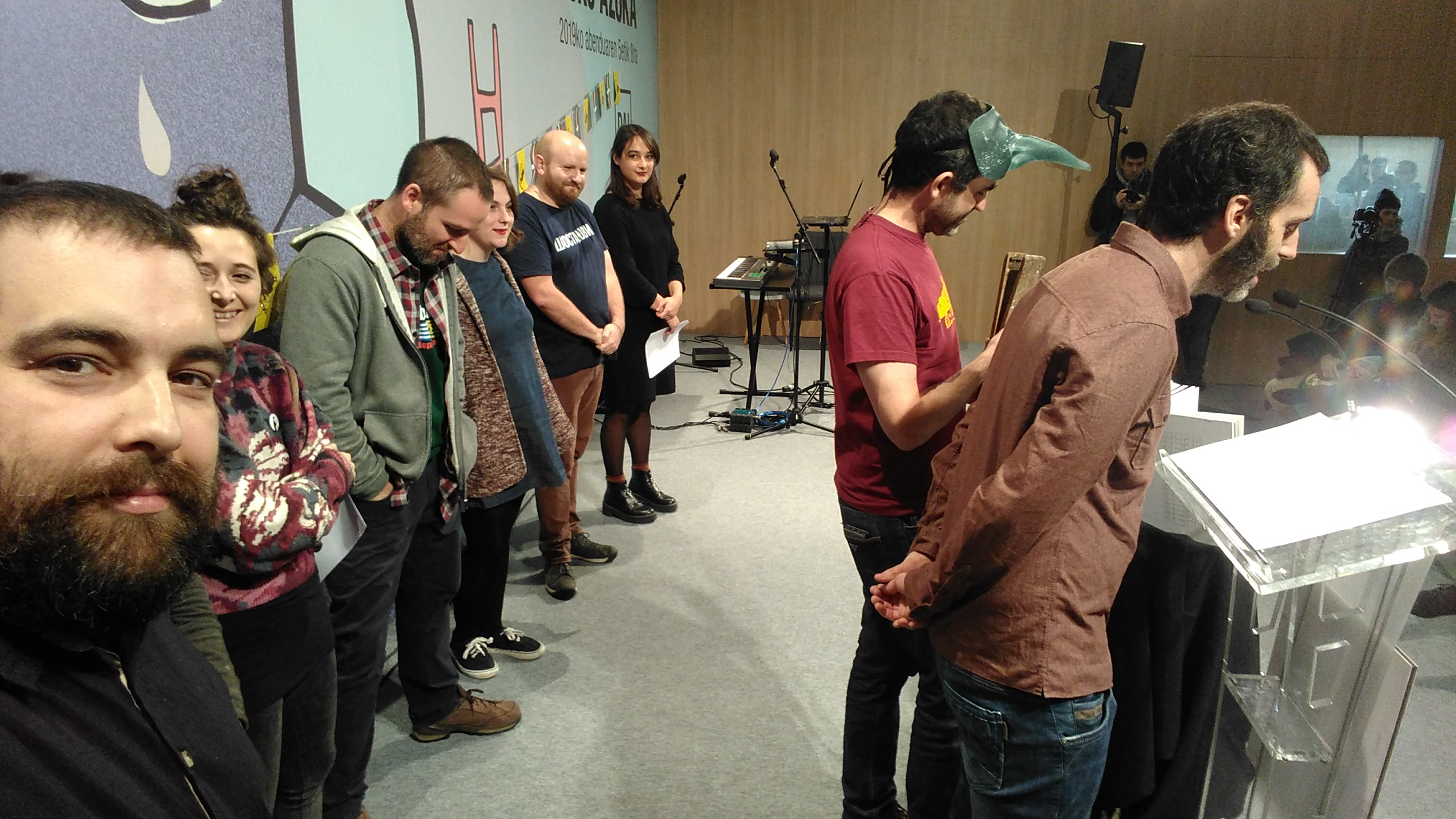 Atopia aurkezpena Durangoko Azokan - prentsaurrekoa